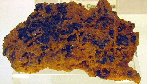 Asbolane from Peñamellera (Asturias)-(Spain)